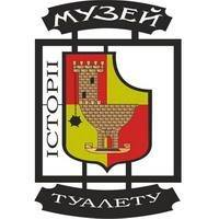 логотип київського Музею історії туалету - башта в вигляді унітаза